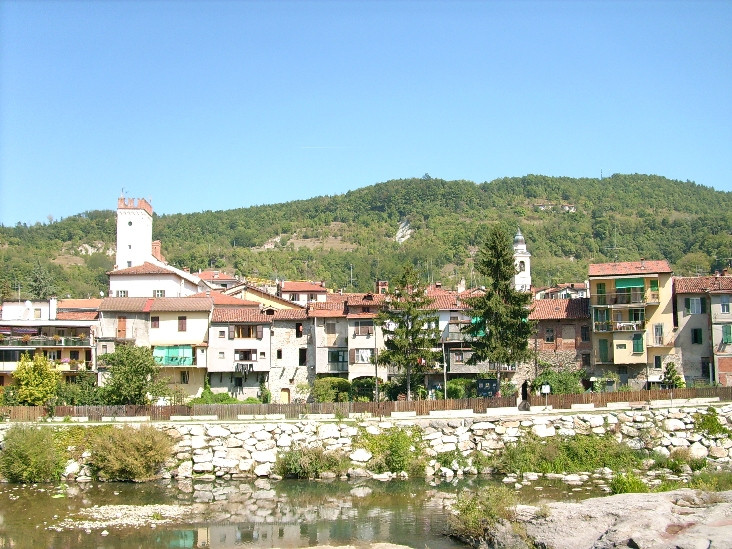 Millesimo, Liguria, Italia